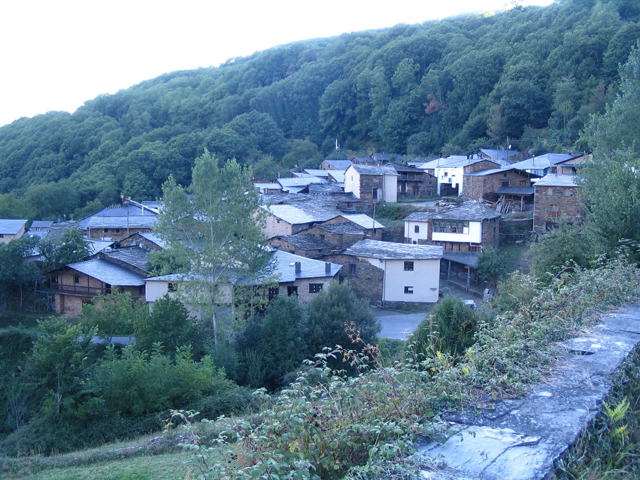 Seceda en O Courel, Lugo, Spain